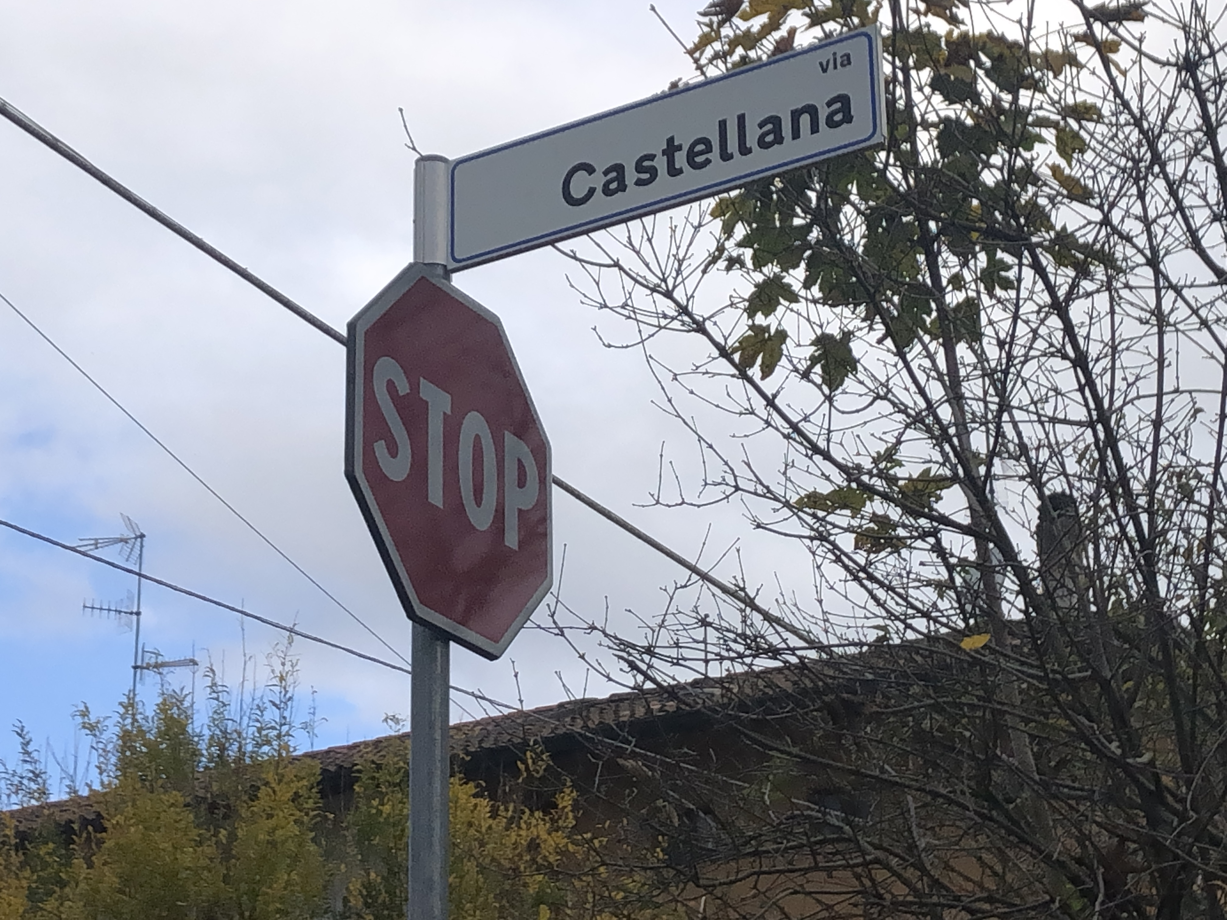 Segnaletica per Castello di Soffumbergo